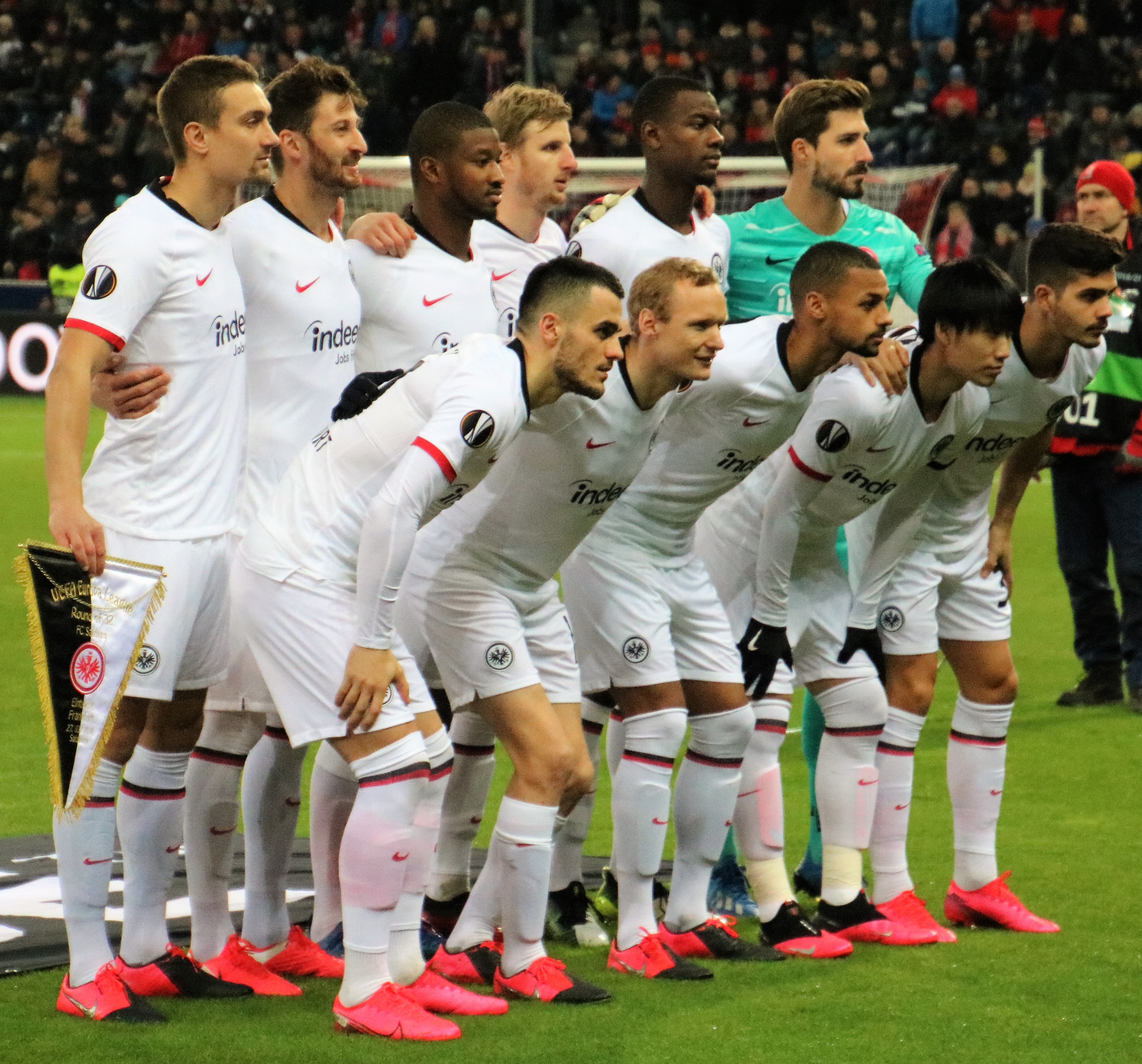 EL Sechzehntelfinale Rückspiel 2:2